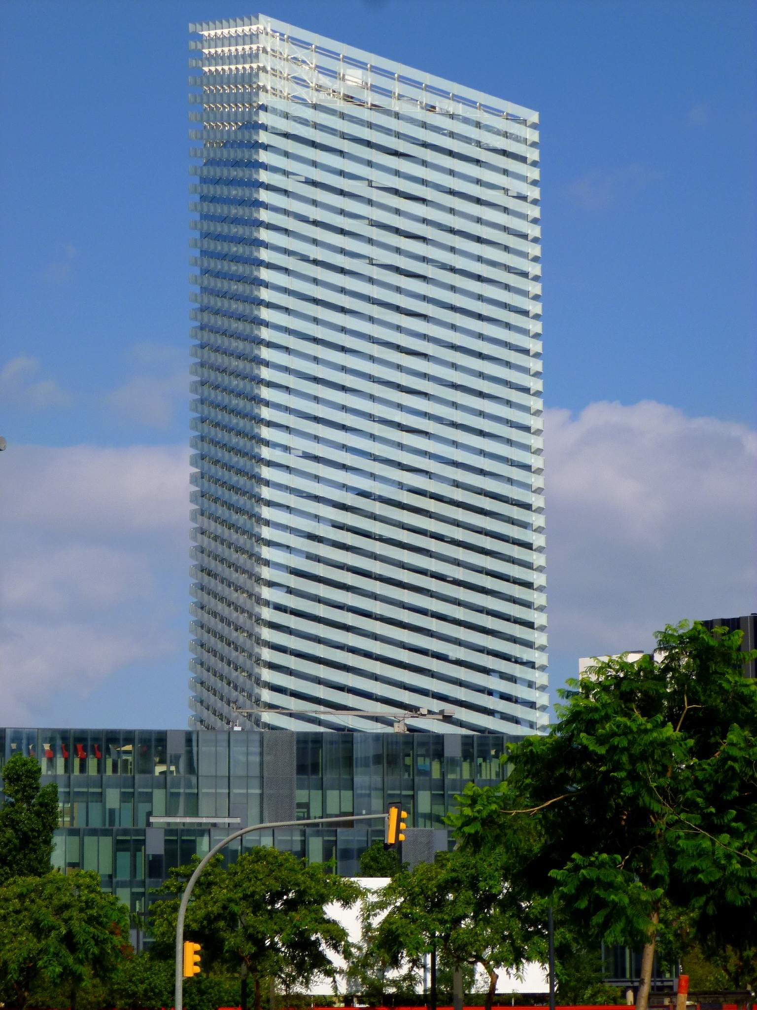 Torre Puig (Hospitalet de Llobregat)